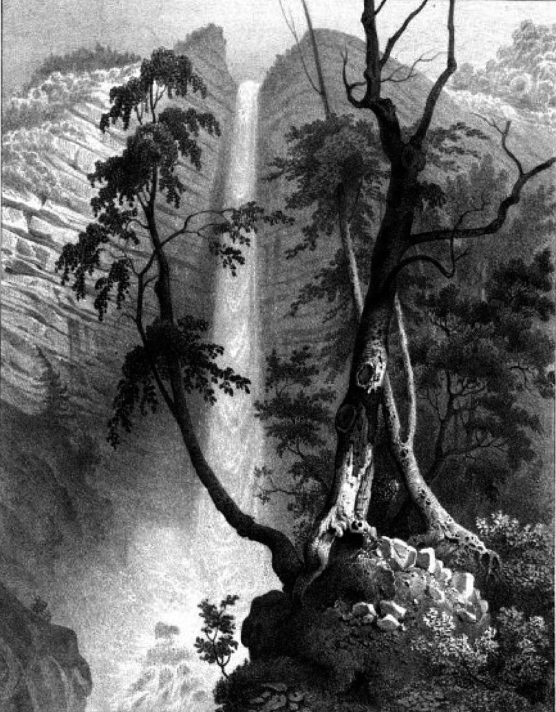 Album du Dauphiné - tome IV, litographie de la cascade de Craponoz, du ruisseau de Craponoz qui separe les communes de Crolles et Bernin, Isère